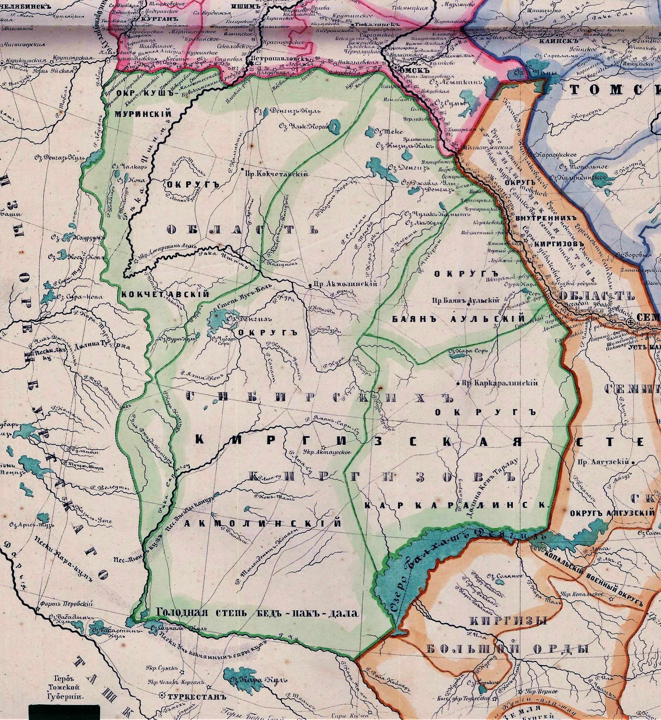 Область Сибирских Киргизов. 1857